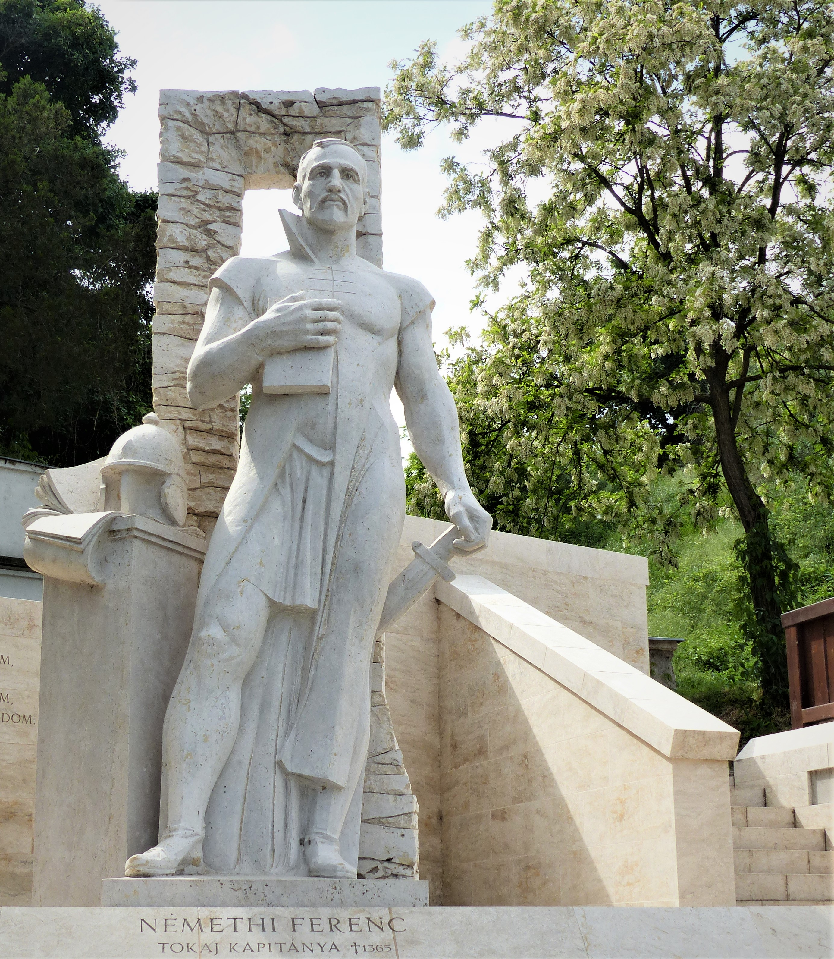 Némethi Ferenc várkapitány emlékműve Tokajban. A felvétel 2018. május 8-án, kedden készült.